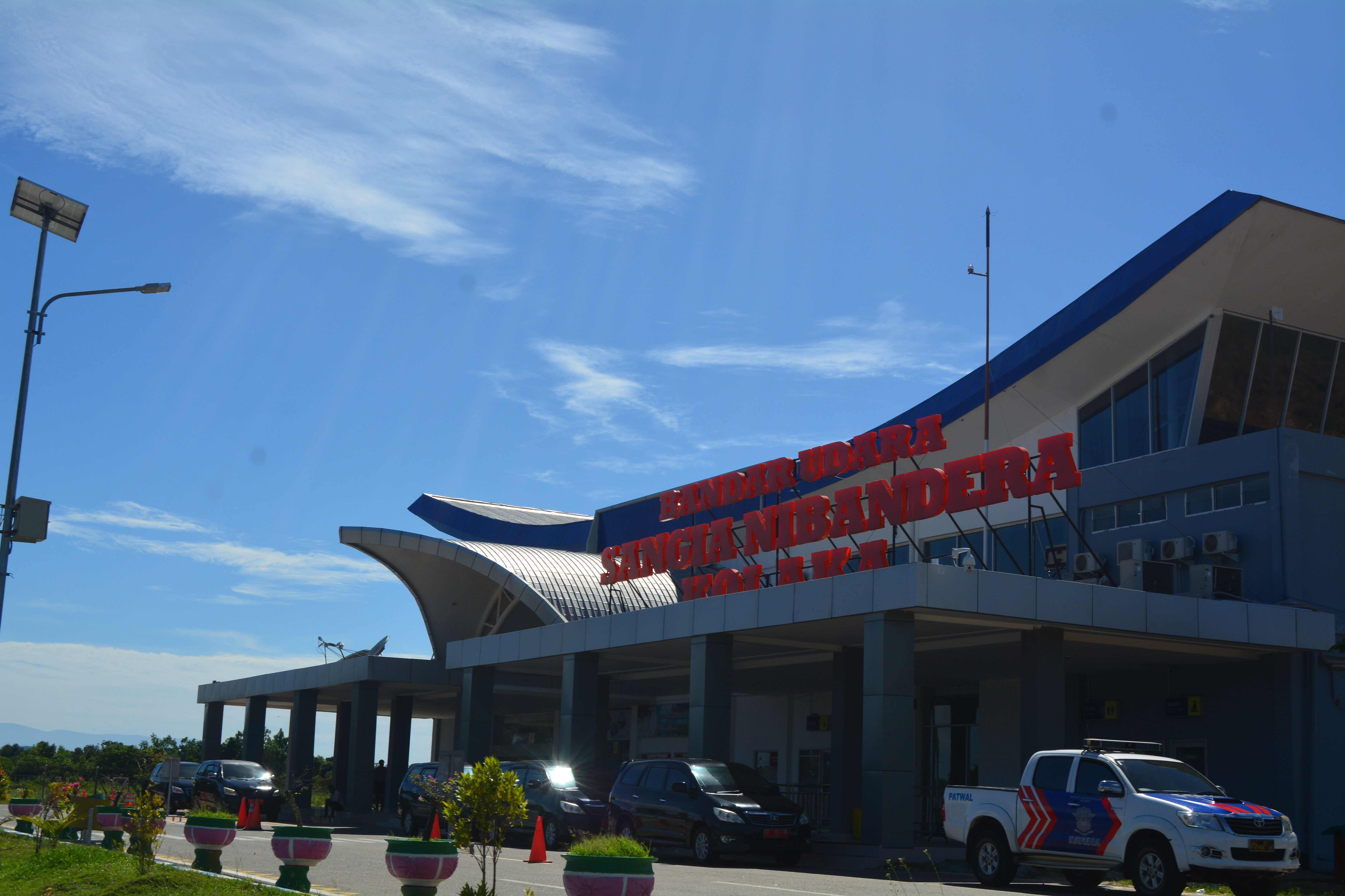 Tampak luar dari Bandar Udara Sangia Nibandera